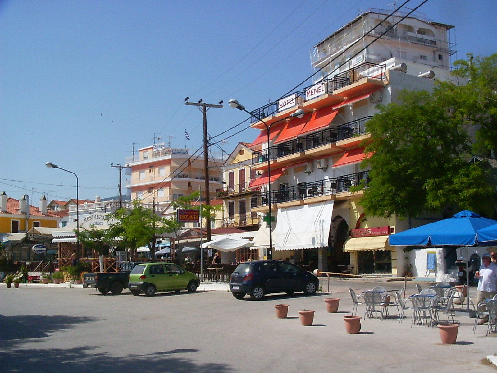 Limenaria